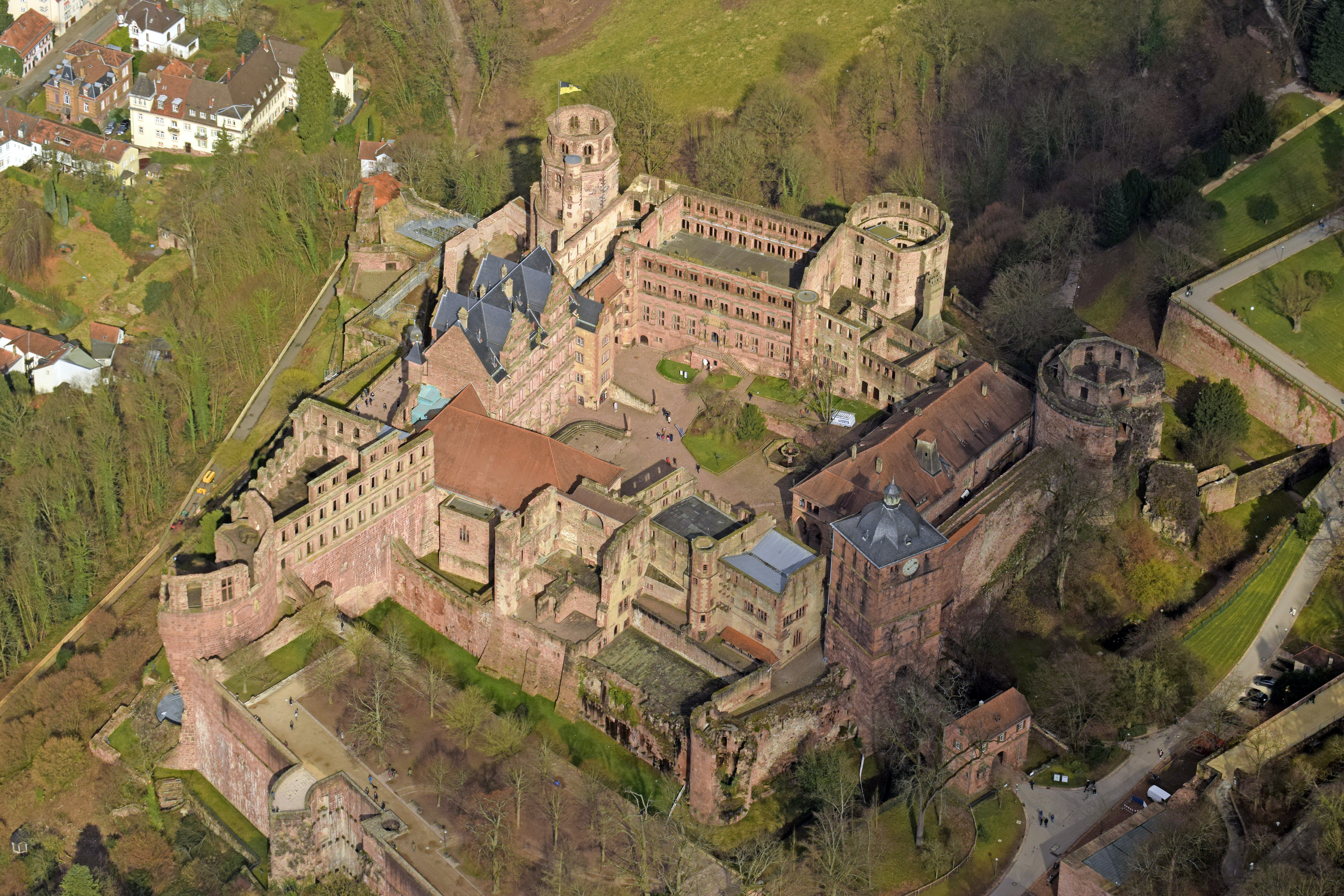 Schloss Heidelberg vom Tragschrauber aus